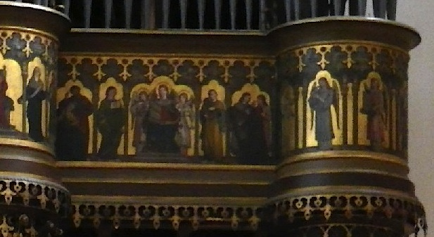 Detail der Brüstungsmalerei